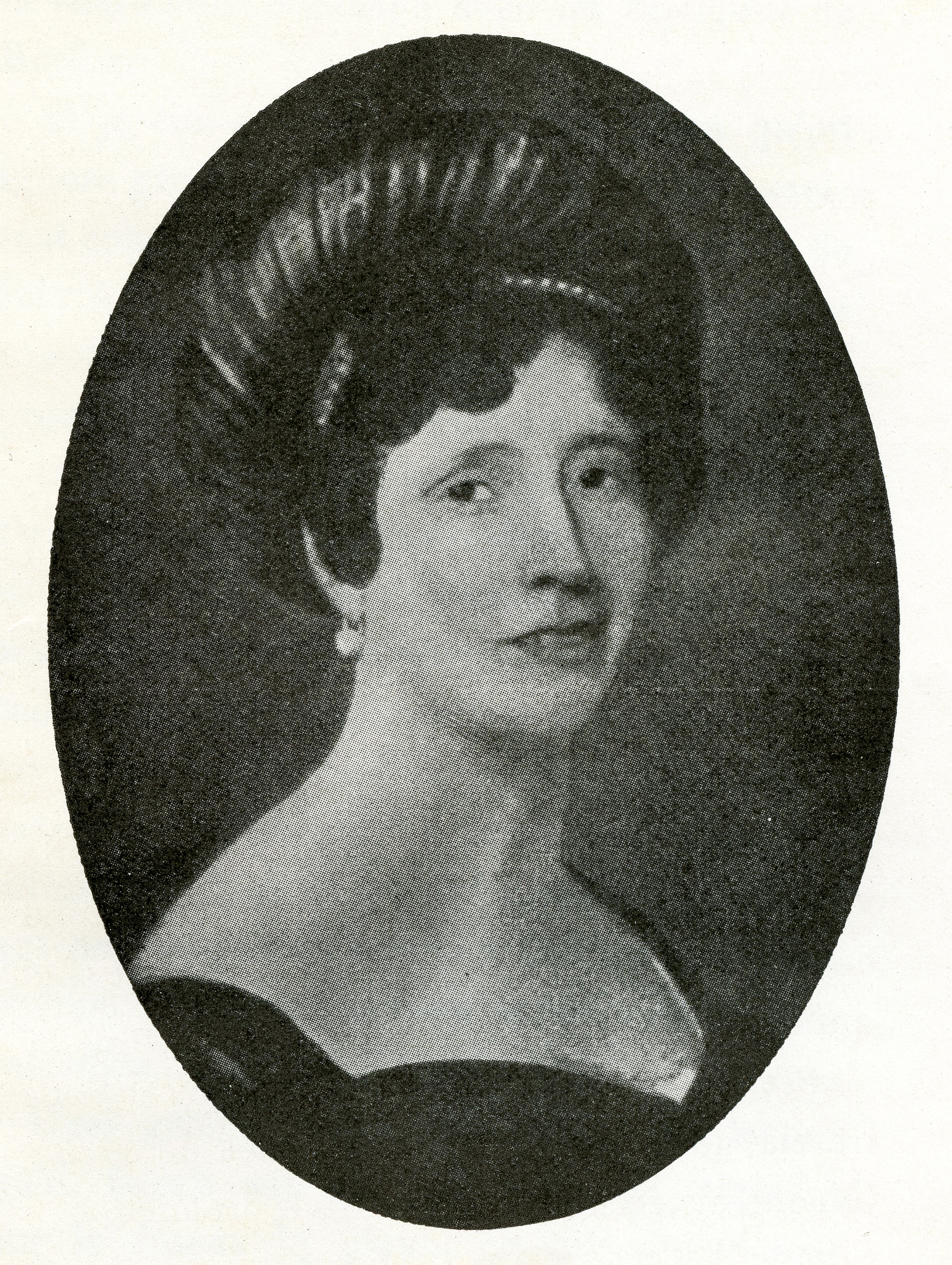 Peinture, portrait.